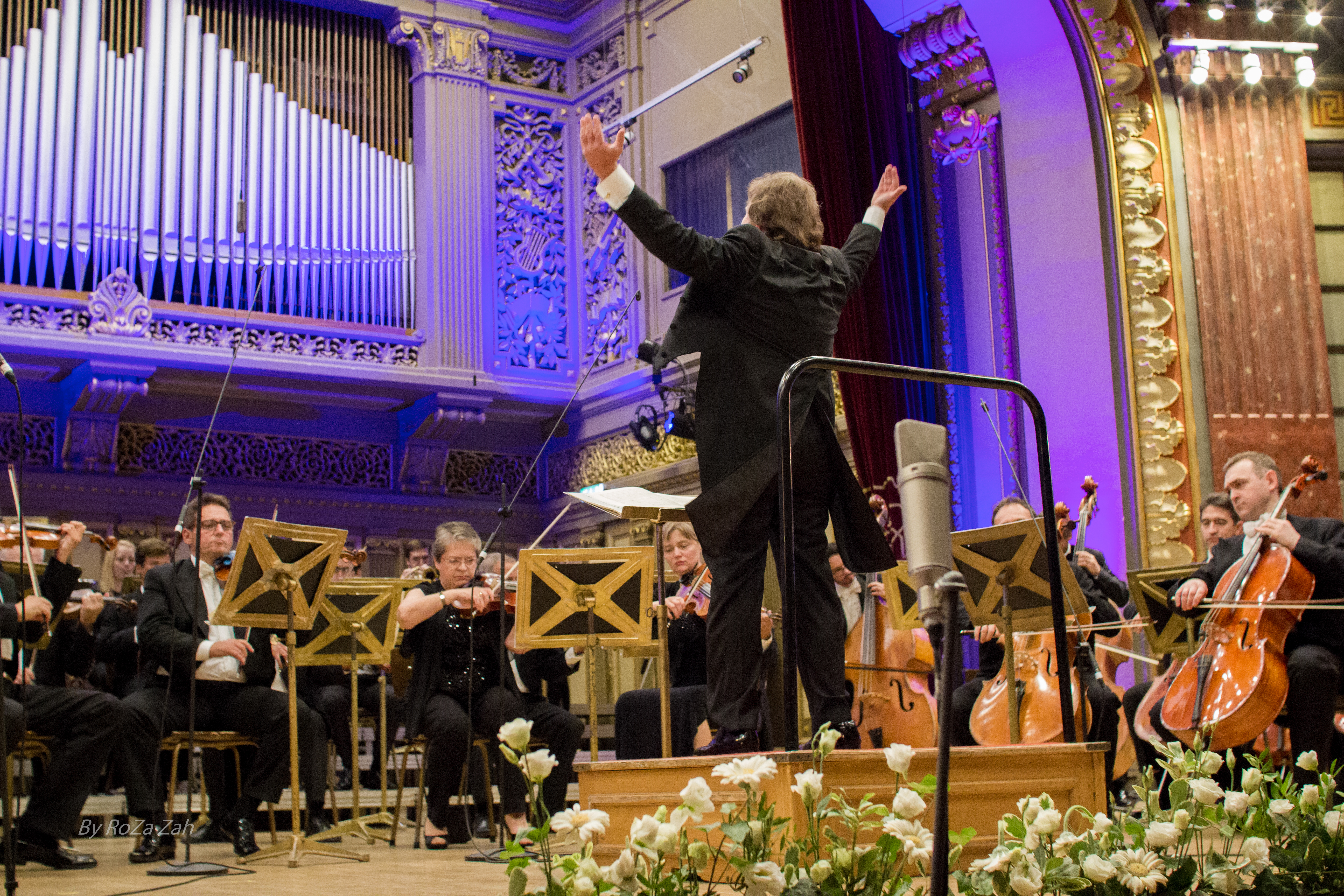 Konzert